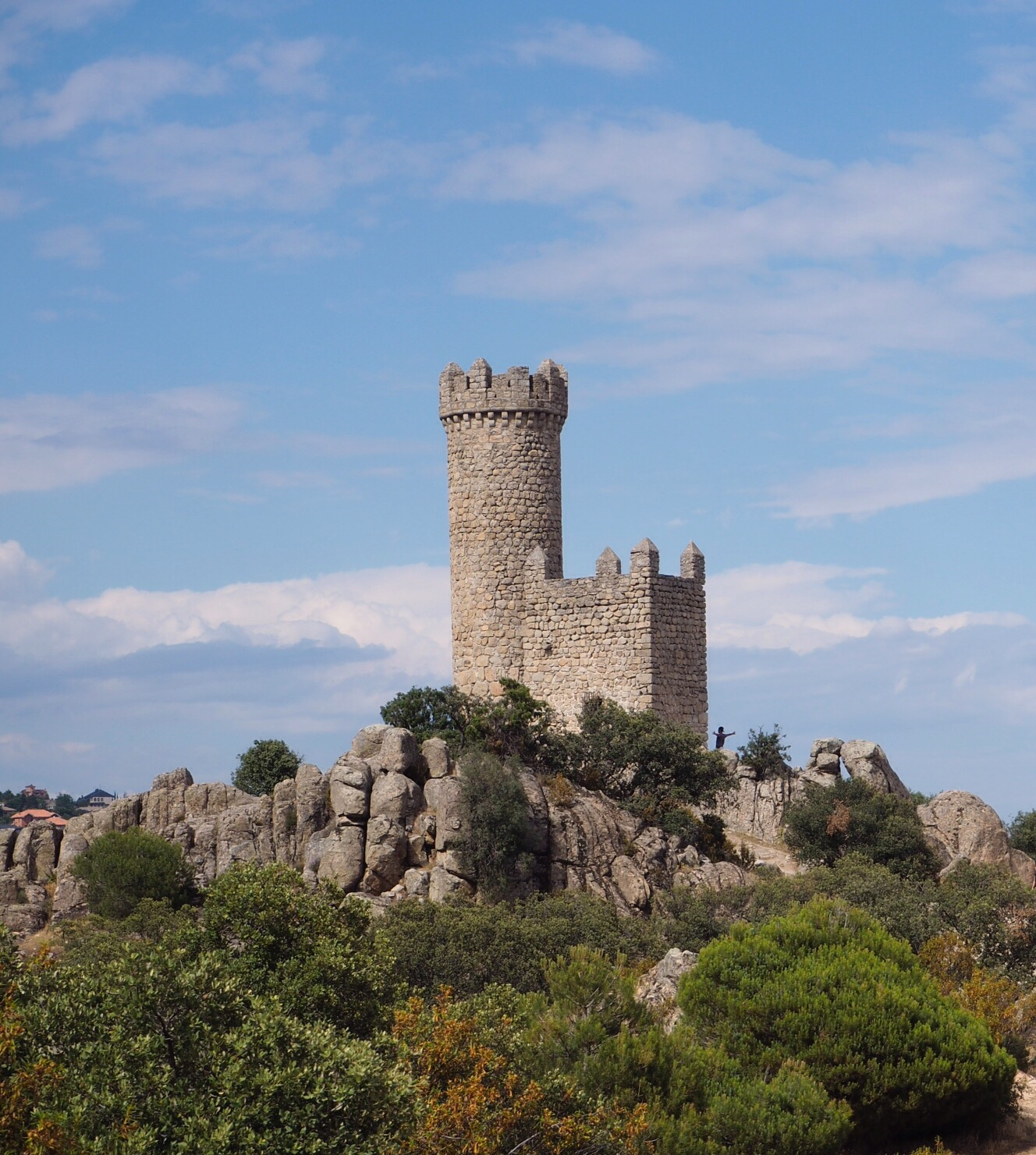 Atalaya de Torrelodones